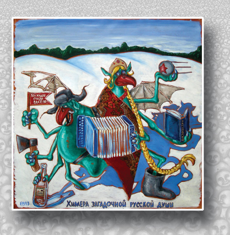 Painting by Lena Hades (Лена Хейдиз) entitled "Химера загадочной русской души", oil painting.